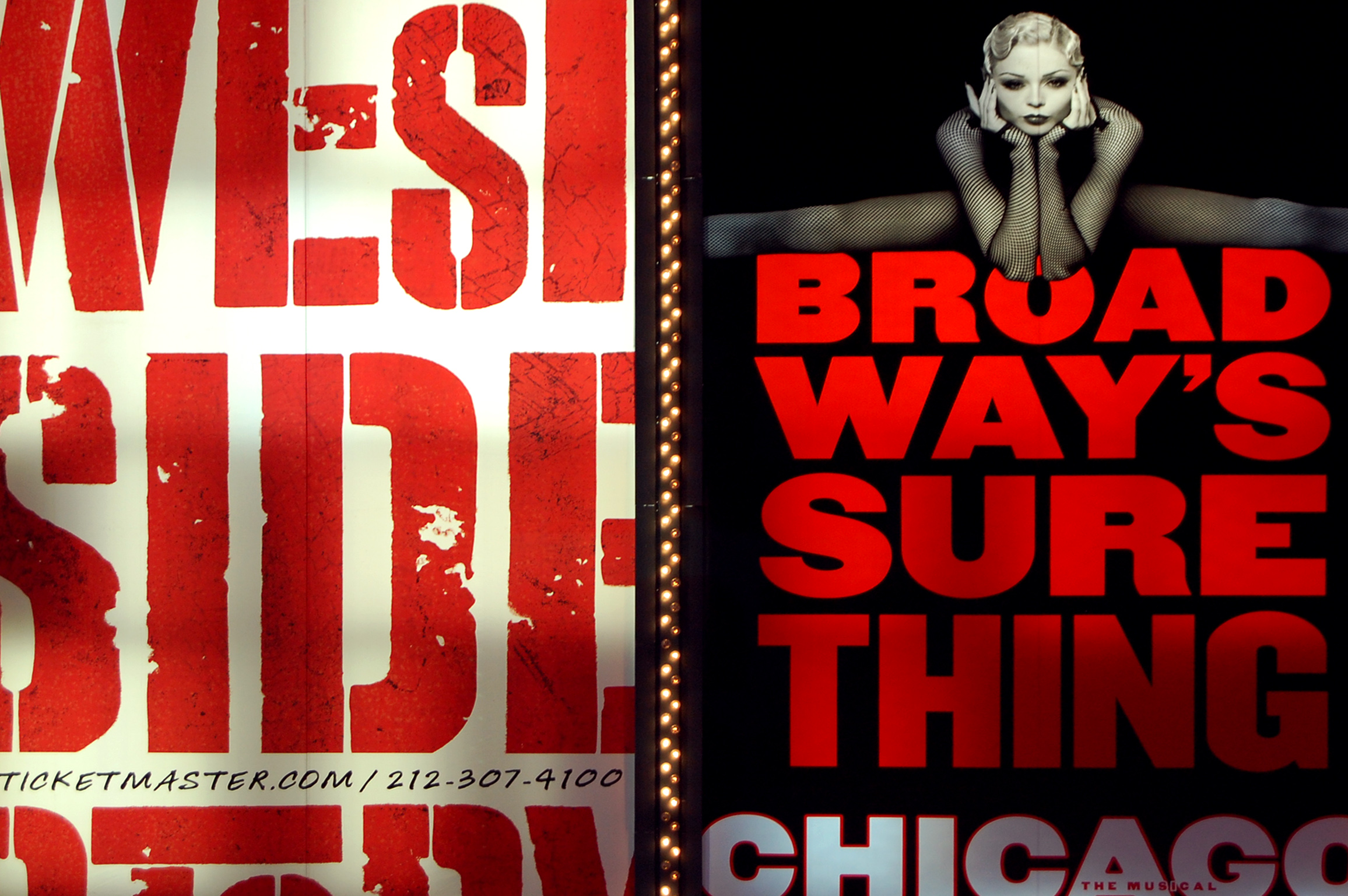 Time Square, NYC